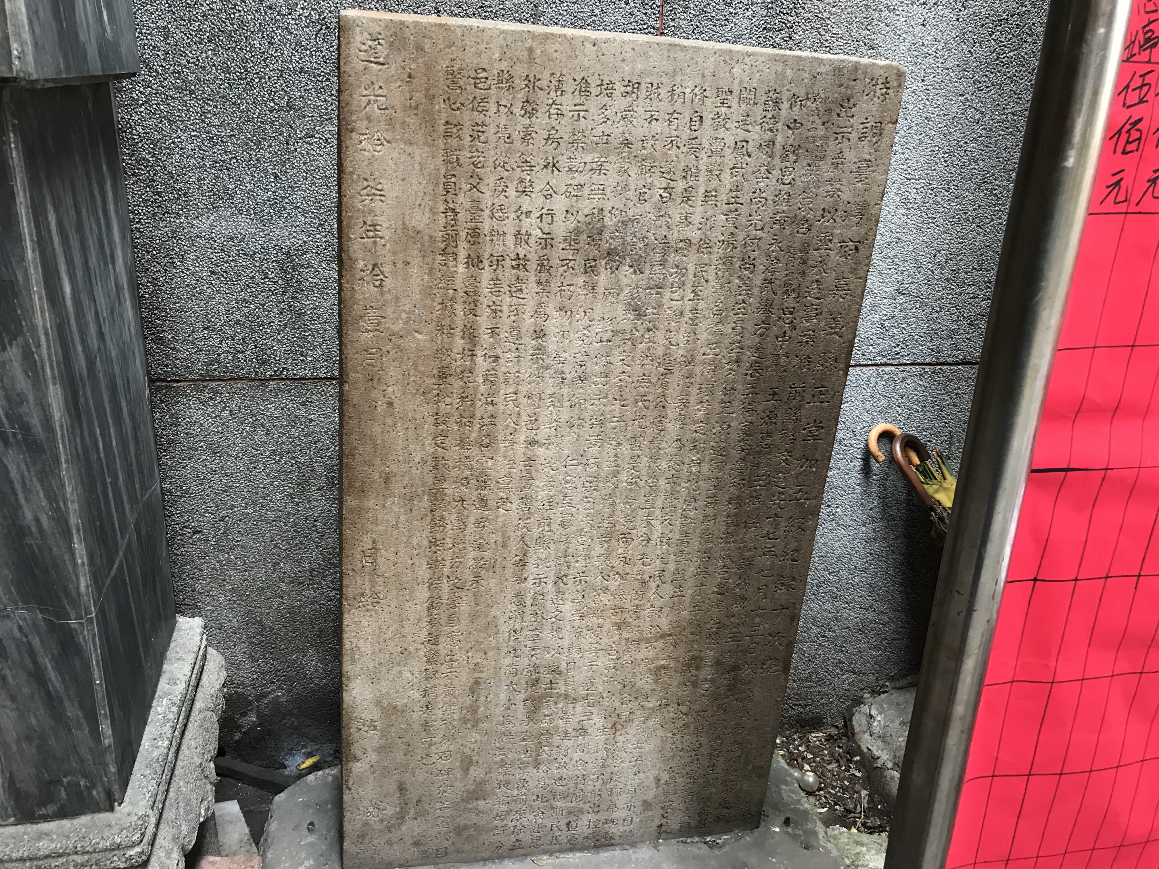 鎮南聖神宮的嚴禁衙蠹酷索水錢班數碑。